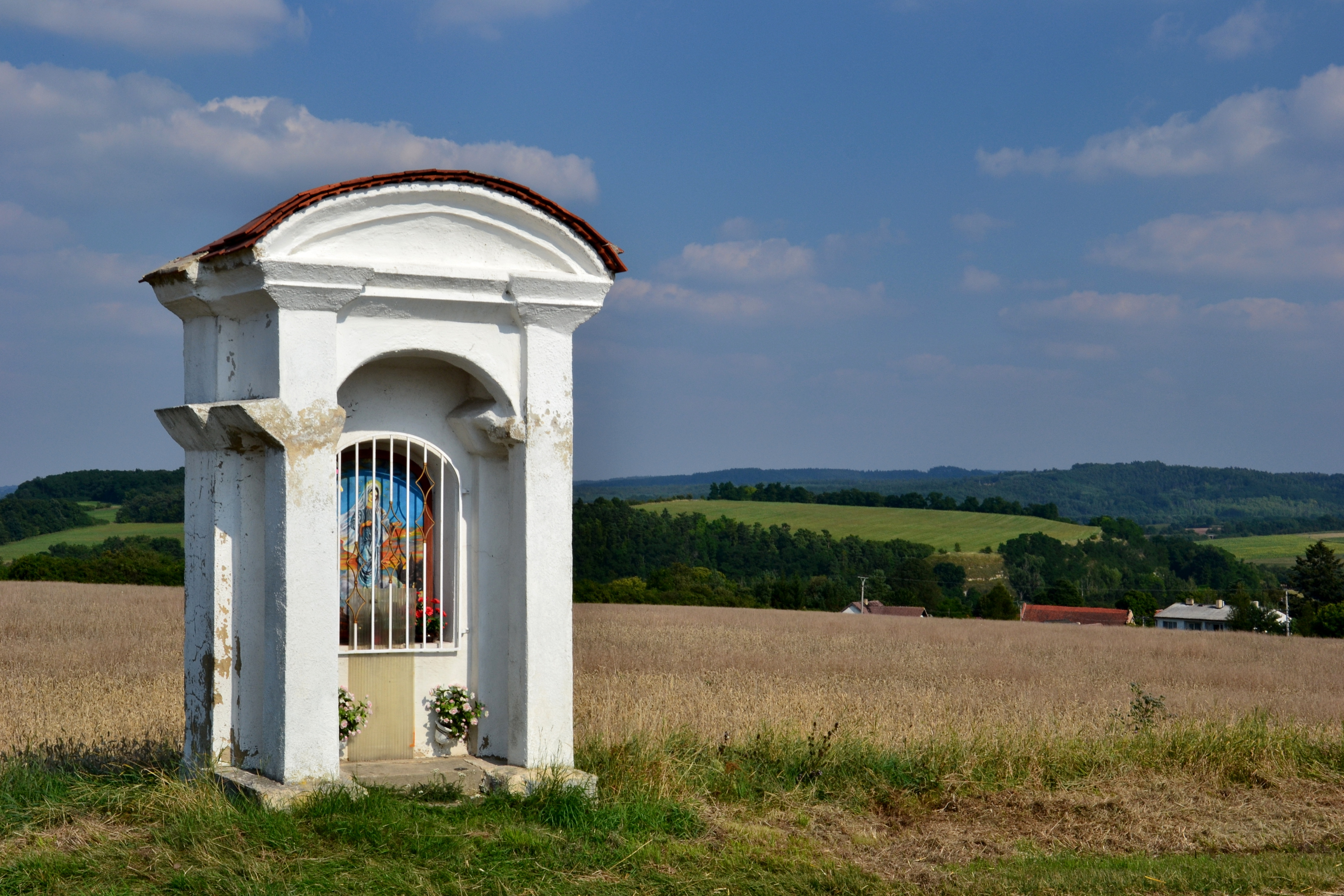 Výklenková kaplička (Železná), na silnici k Milčevsi, Železná